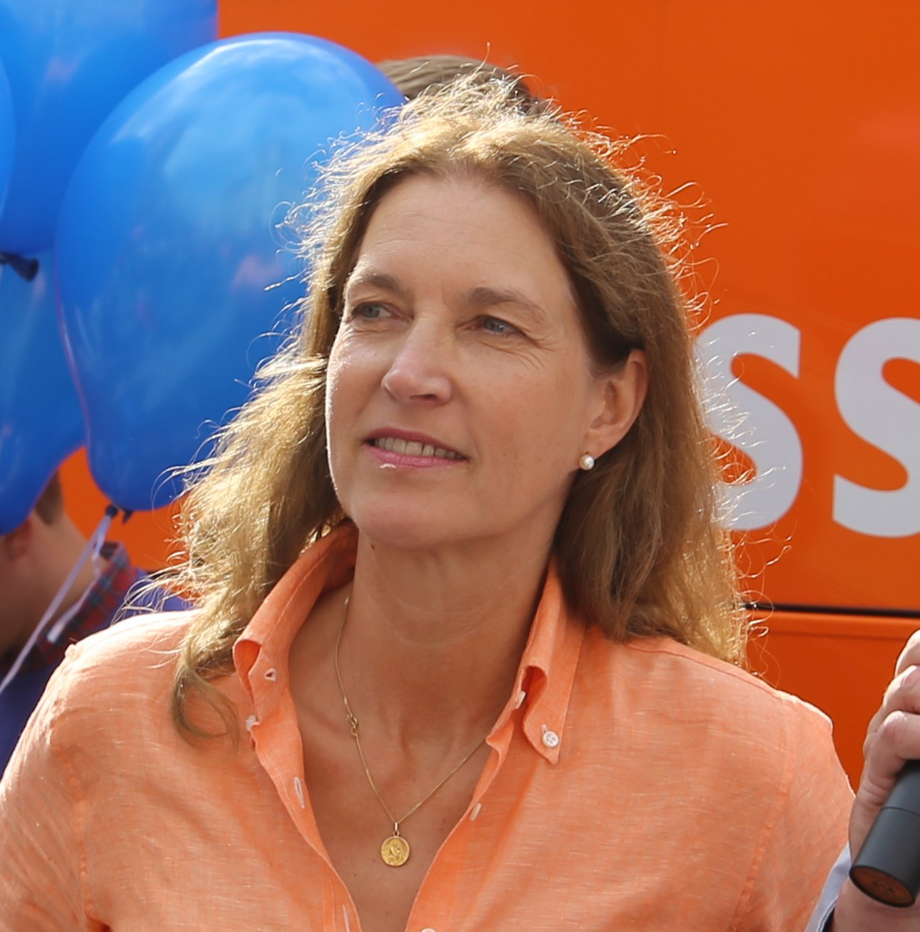 Hedwig Freifrau von Beverfoerde, deutsche Aktivistin, engagiert sich in konservativen und katholischen Bürgerinitiativen und Netzwerken. Hier am 6. September 2017 auf dem Münchner Stachus während der "Demo für Alle" mit Kundgebung von "Citizen Go" im Rahmen einer Bustour (sog. "Bus der Meinungsfreiheit"). Titel des Werks: "Hedwig von Beverfoerde in München (September 2017)"